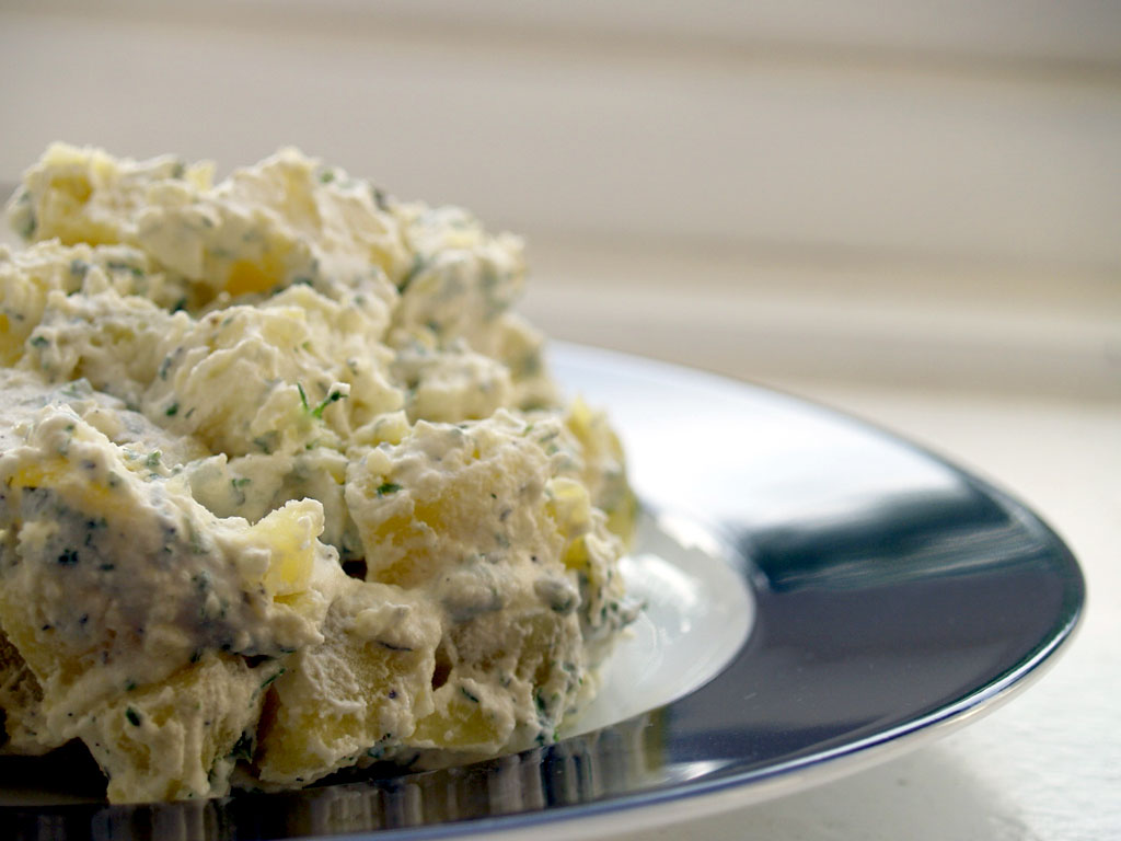 Kartoffelsalat (potato salad) with mayonnaise and dill.